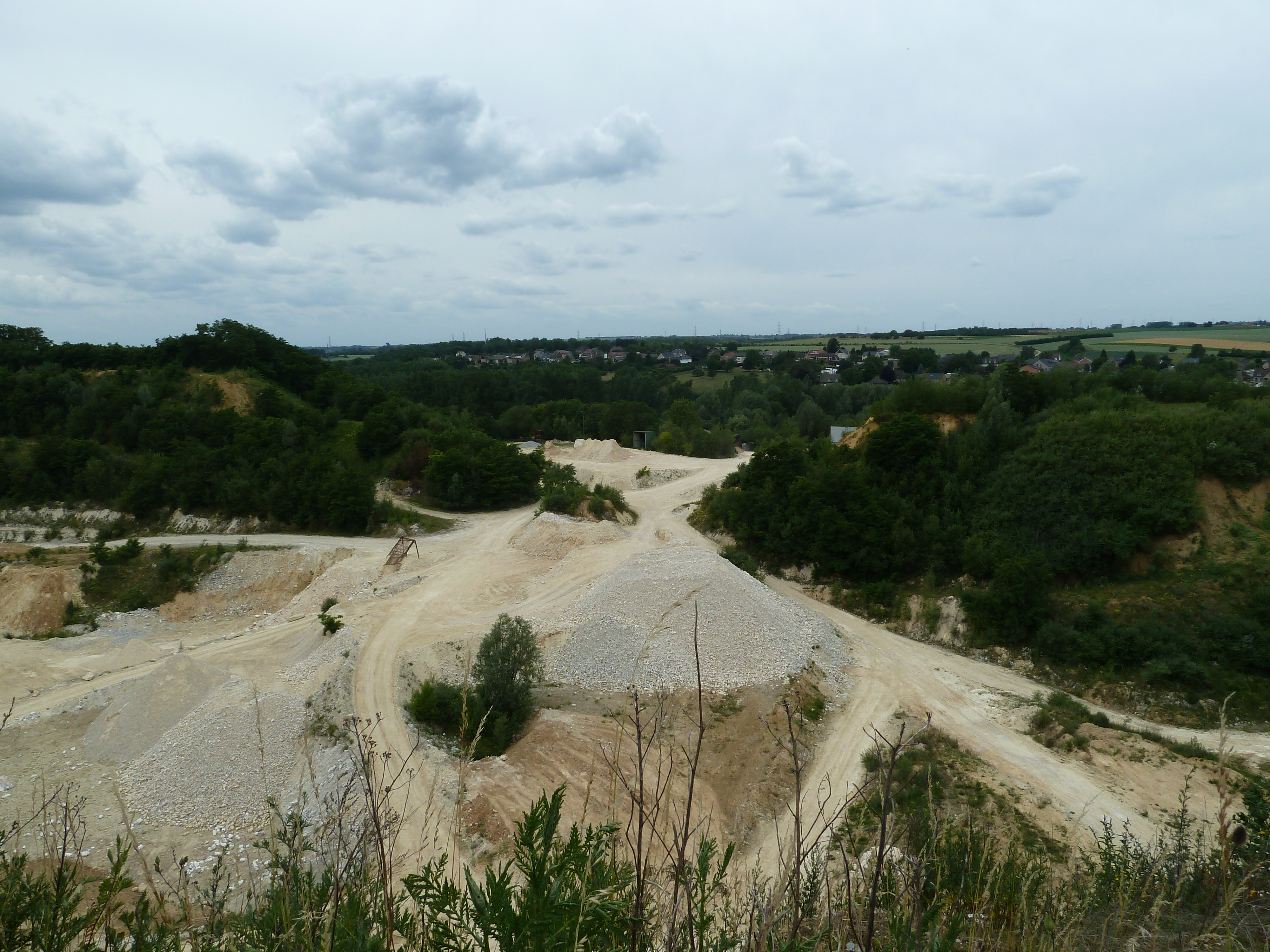 carrière Marnebel, Bassenge, Belgique